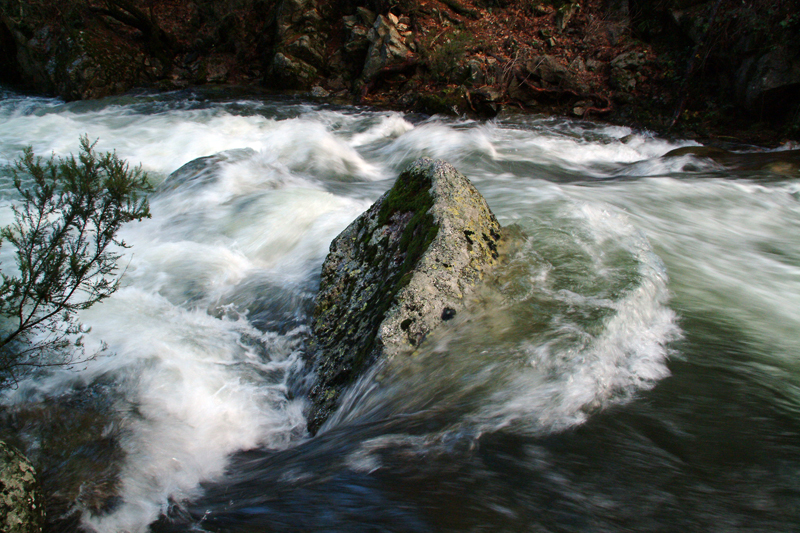 El río Lozoya cerca de su nacimiento